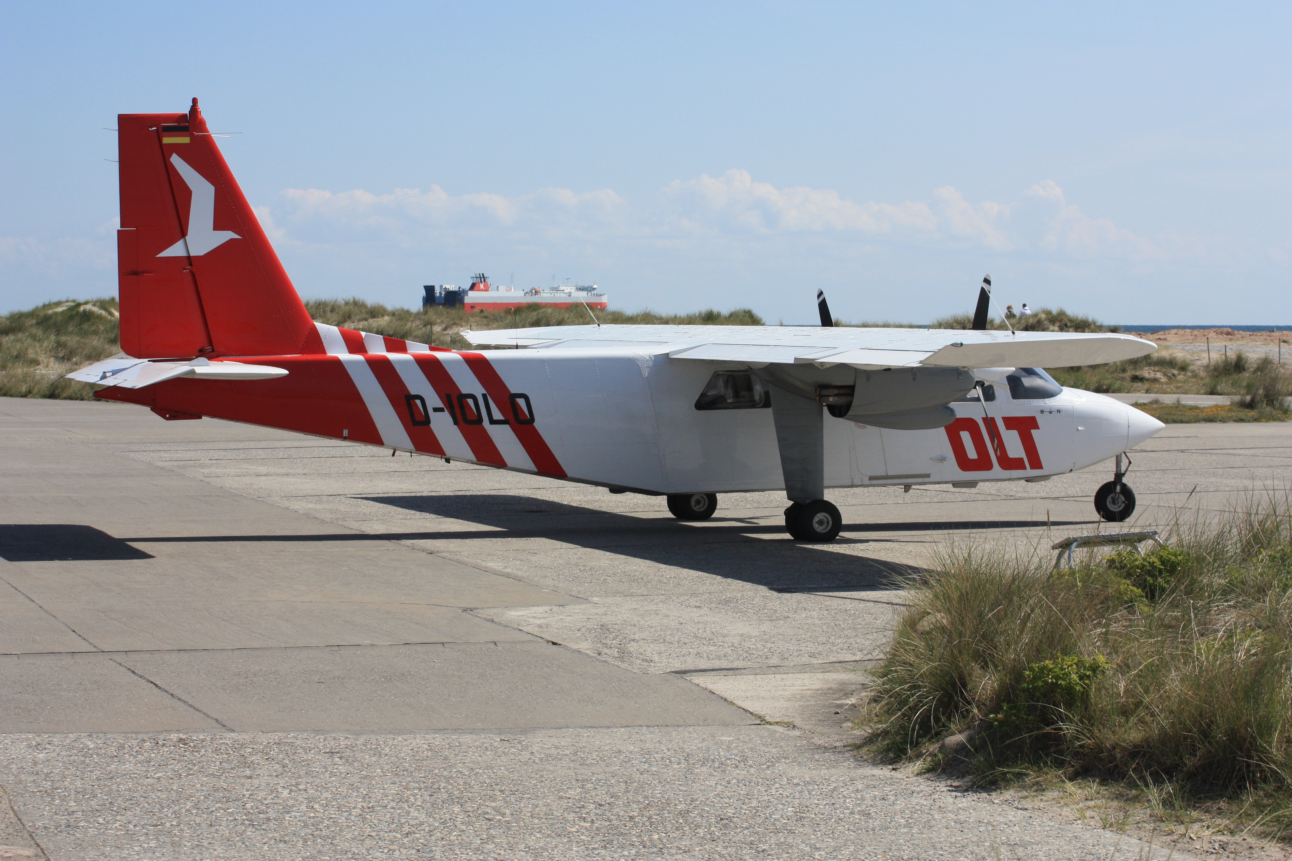 Helgoland Airport; Flugplatz Helgoland-Düne, EDXH